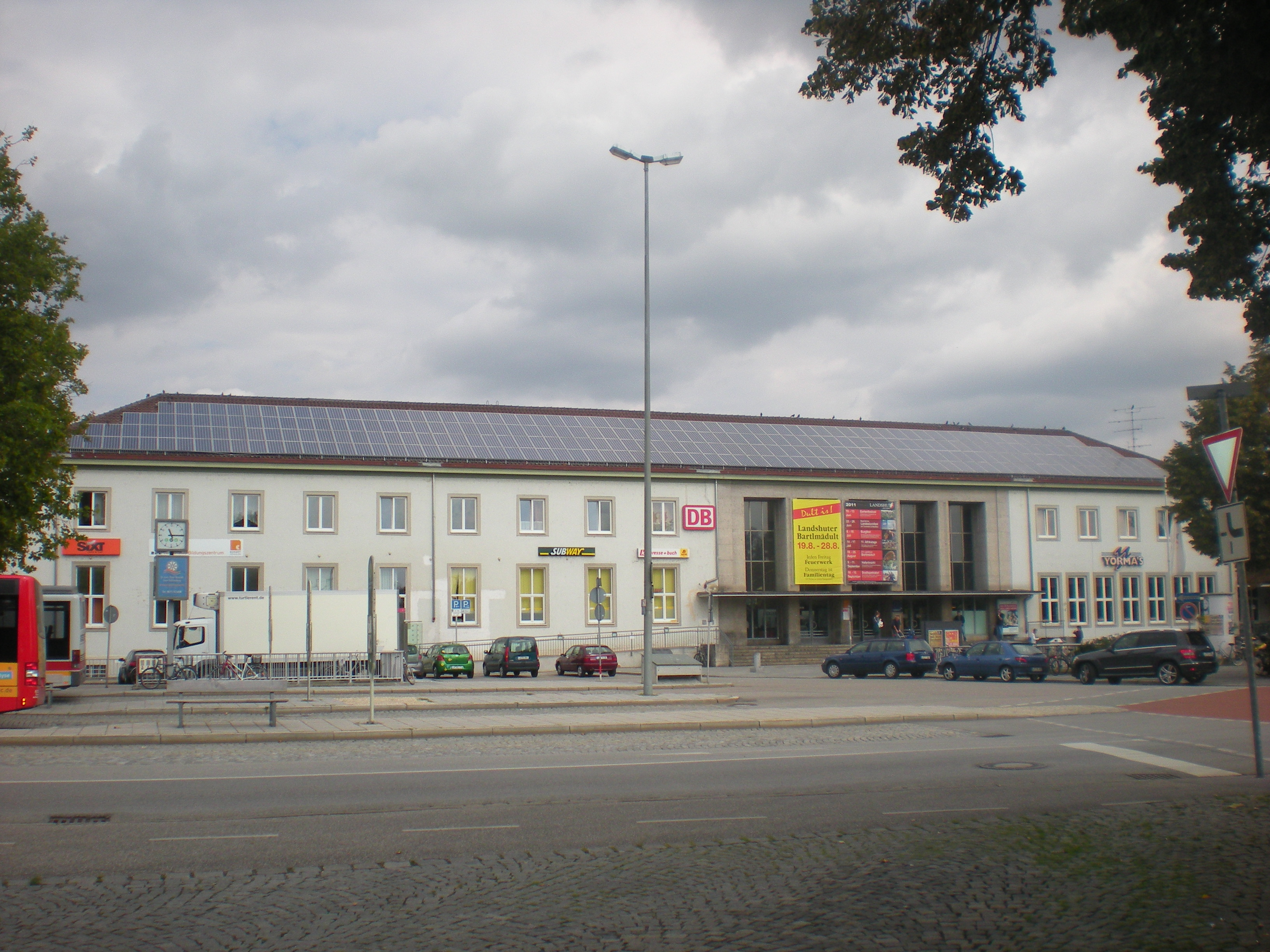 Frontansicht des Bahnhofsgebäudes des Landshuter Hauptbahnhofs